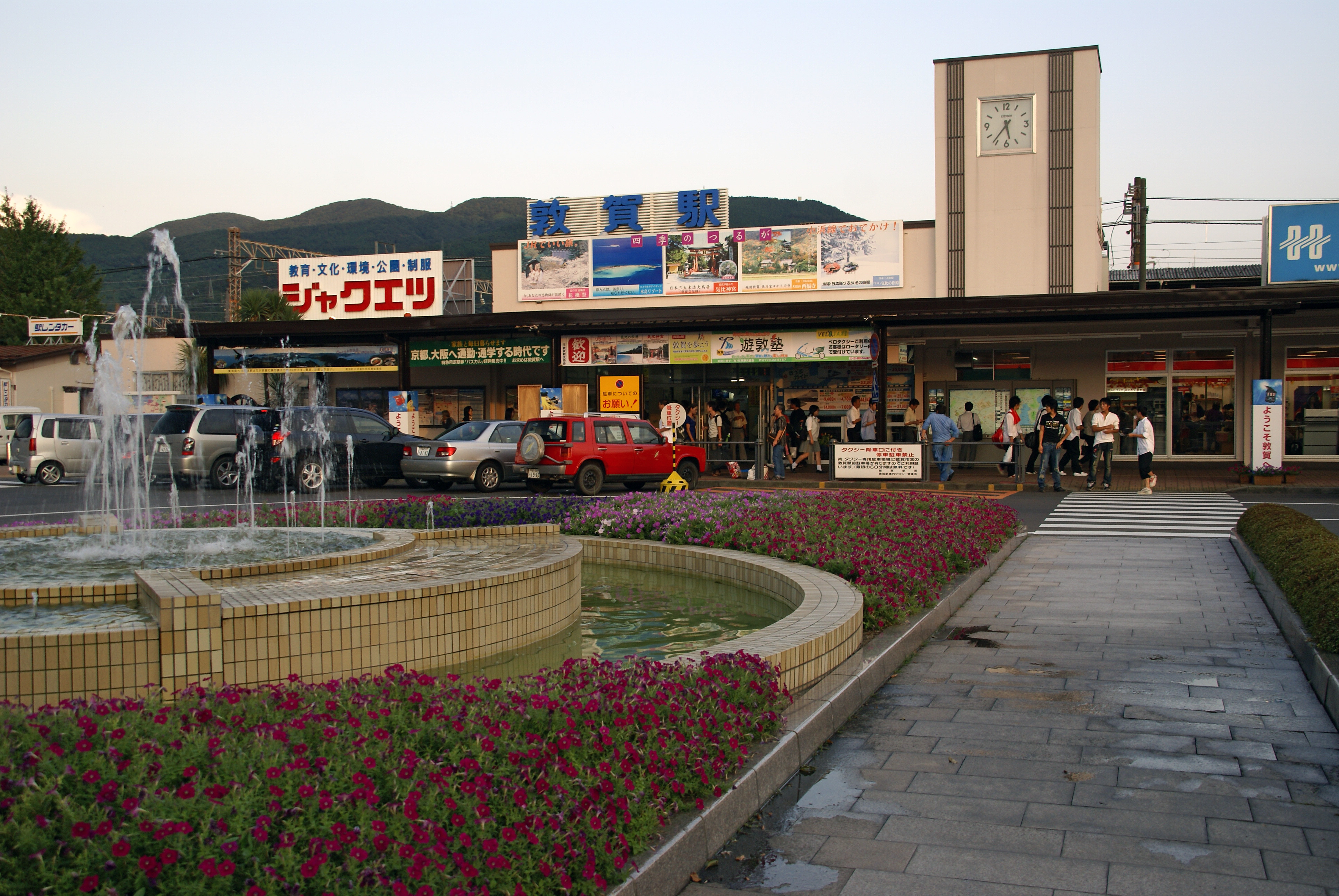 Tsuruga Station in Tsuruga, Fukui prefecture, Japan